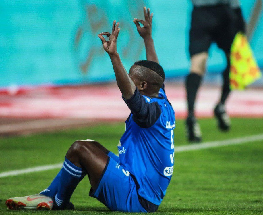 گزارش تصویری از بازی استقلال تهران و پارس جنوبی جم